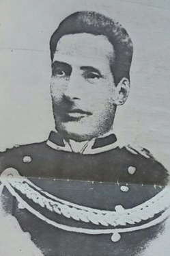 Gavino Contini intorno al 1875